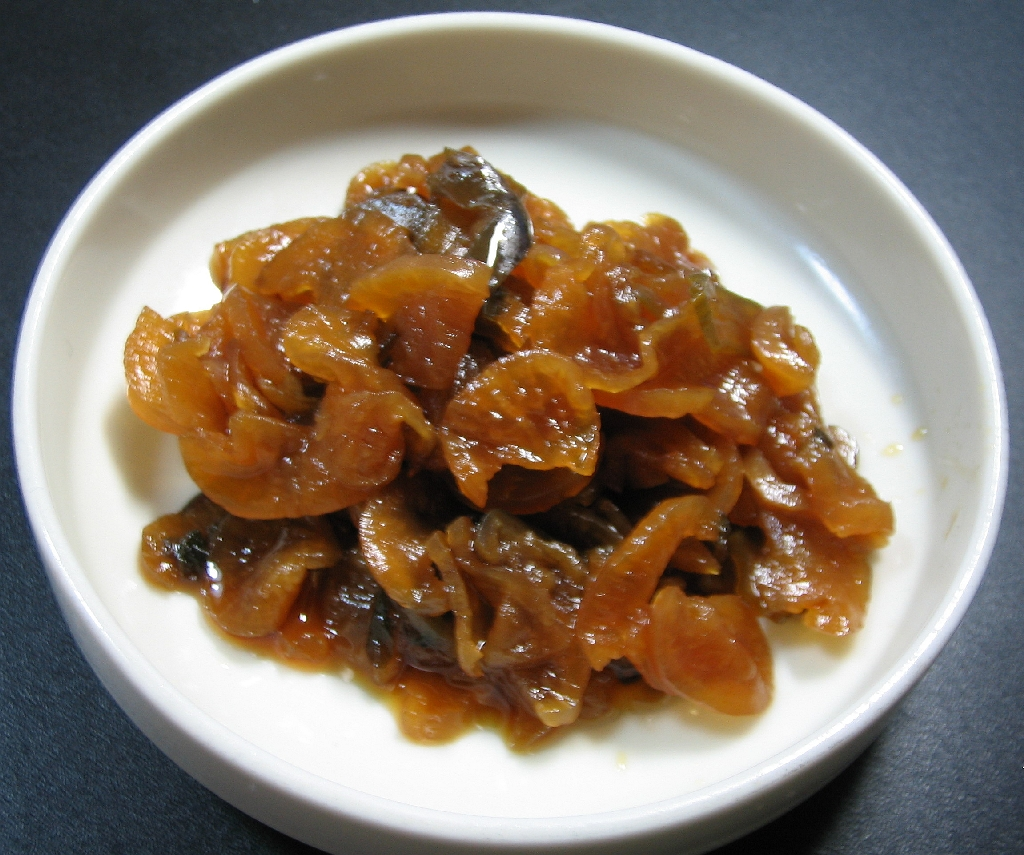 福神漬 (Fukujinzuke)。A japanese pickle.